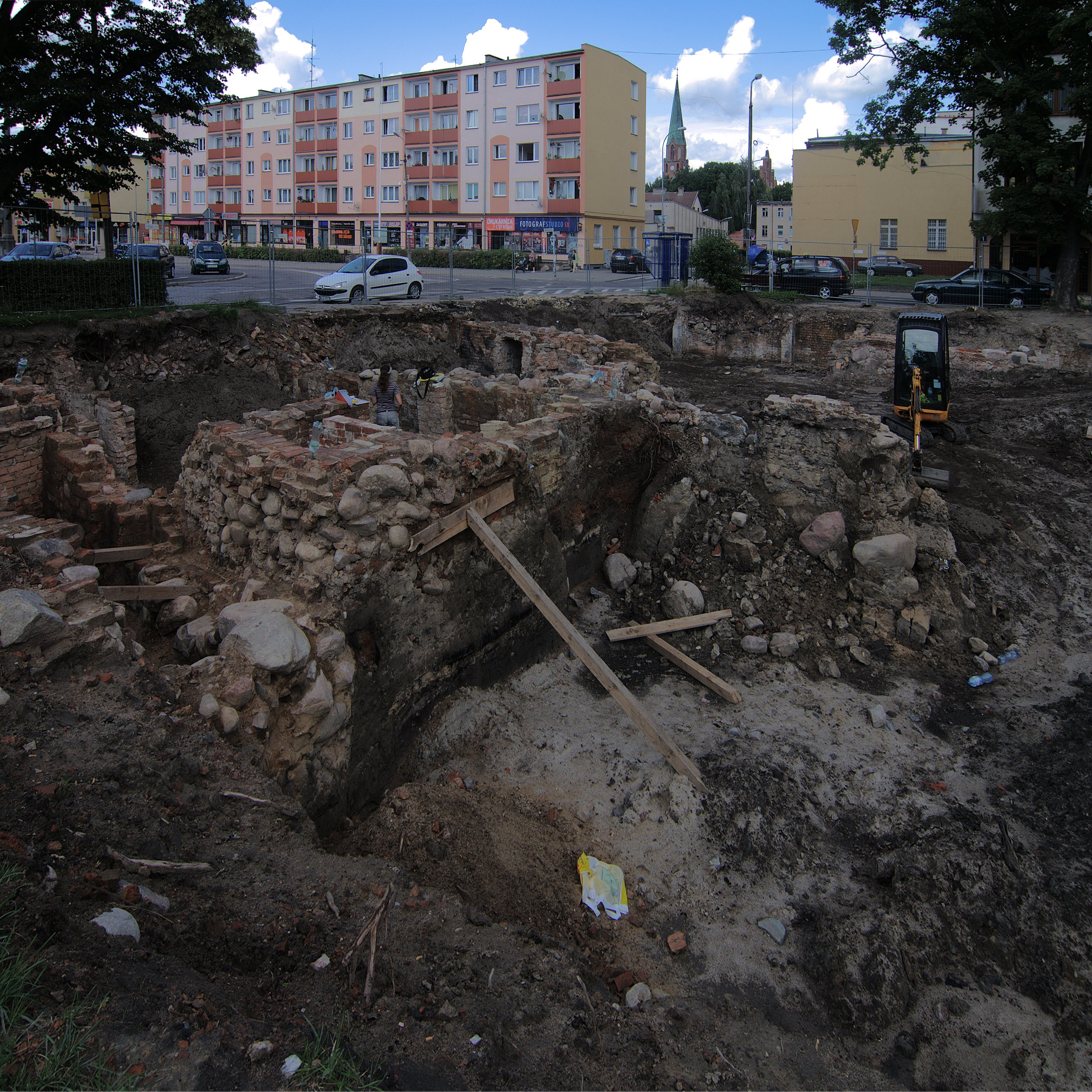 Lębork. Prace archeologiczne na ilicy Floriańskiej.